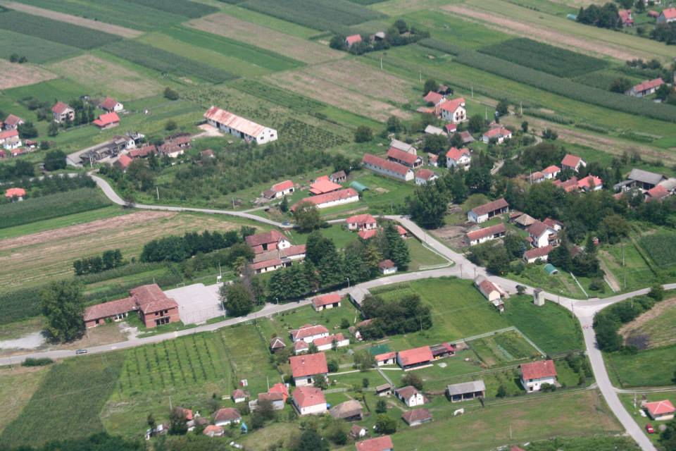 Српски (ћирилица): Слика из ваздуха села Пепељевац